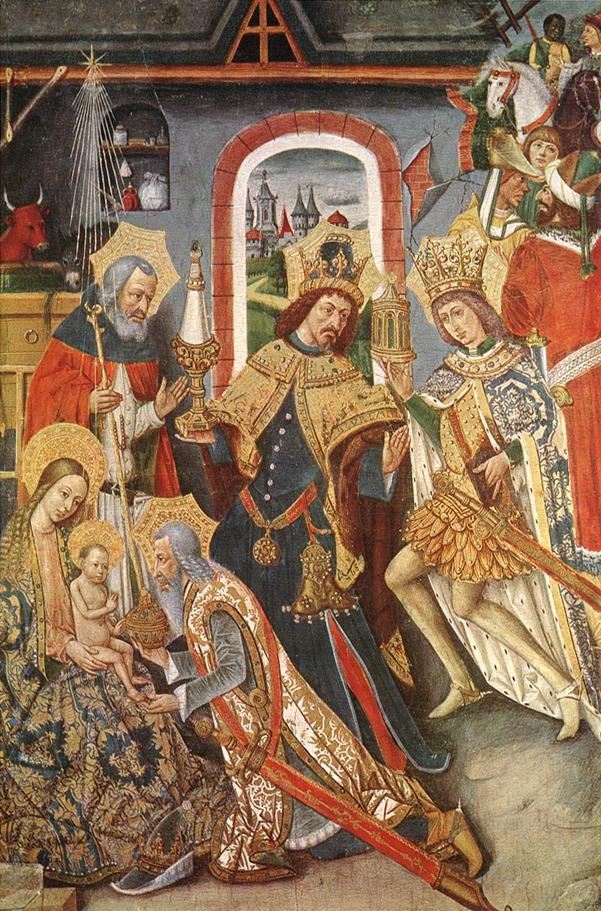 Taula central del retaule de l'Epifania